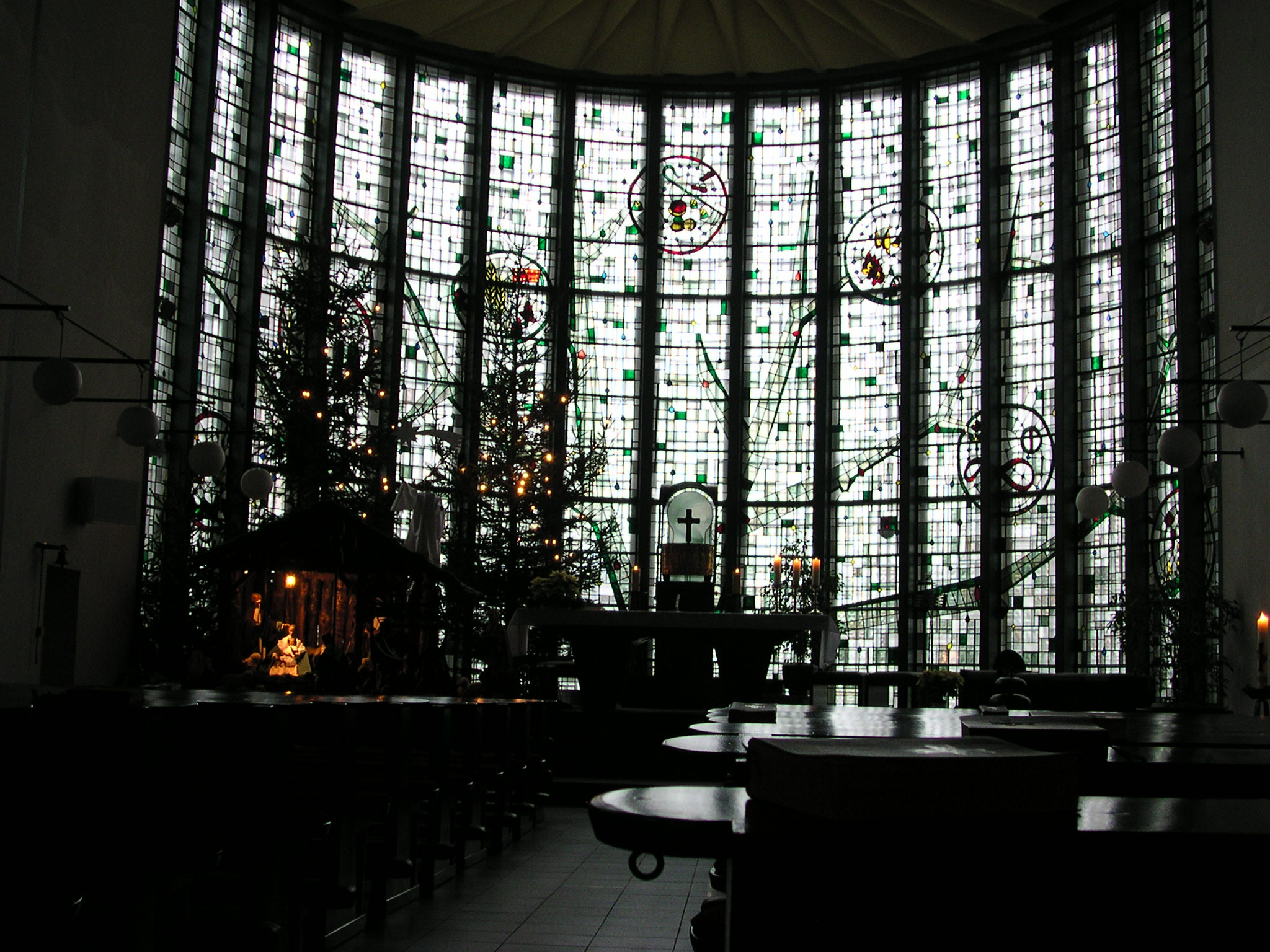 Katholische Pfarrkirche “Johann Baptist” in Hünshoven, einem Stadtbezirk von Geilenkirchen. Entworfen von Dominikus und Gottfried Böhm.